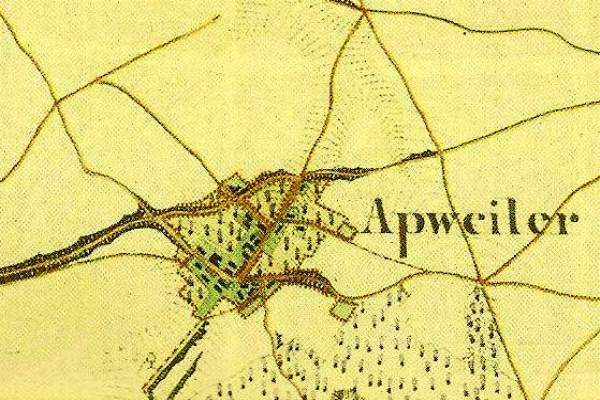 Preußische Kartenaufnahme 1846 - Uraufnahme - (5002 Geilenkirchen)